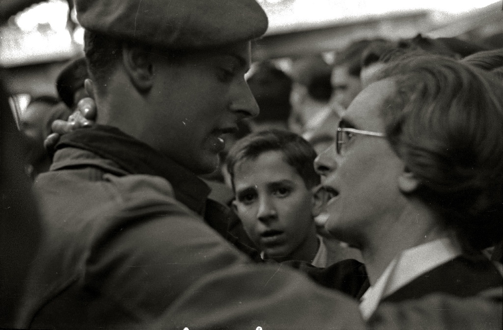 Título original: Llegada a la estación del Norte de soldados heridos en el frente del Este (1/13) Localización: San Sebastián (Guipúzcoa)